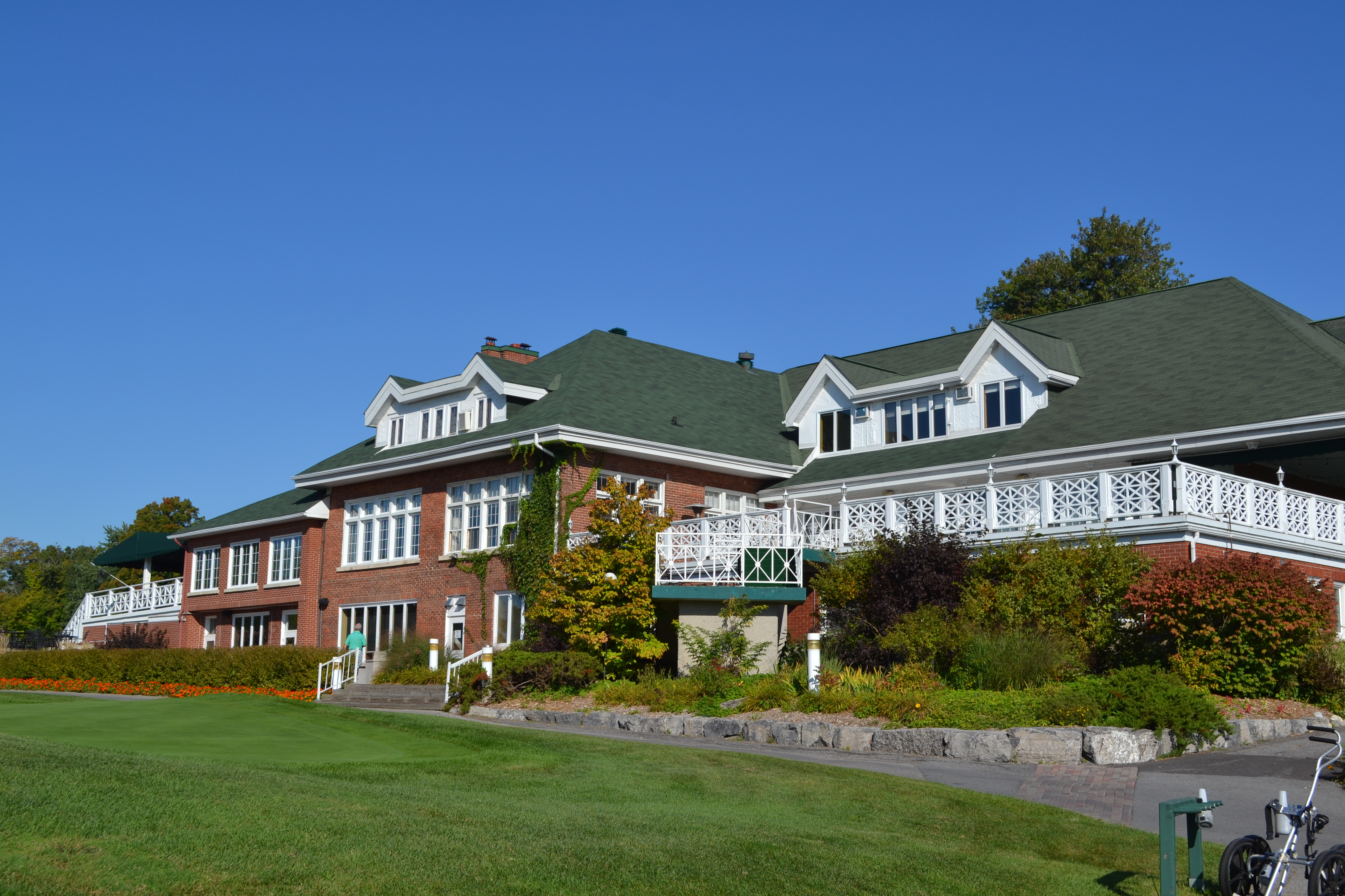 Face avant (partie droite) du chalet du Club-de-Golf-Rivermead, à Gatineau, Quebec